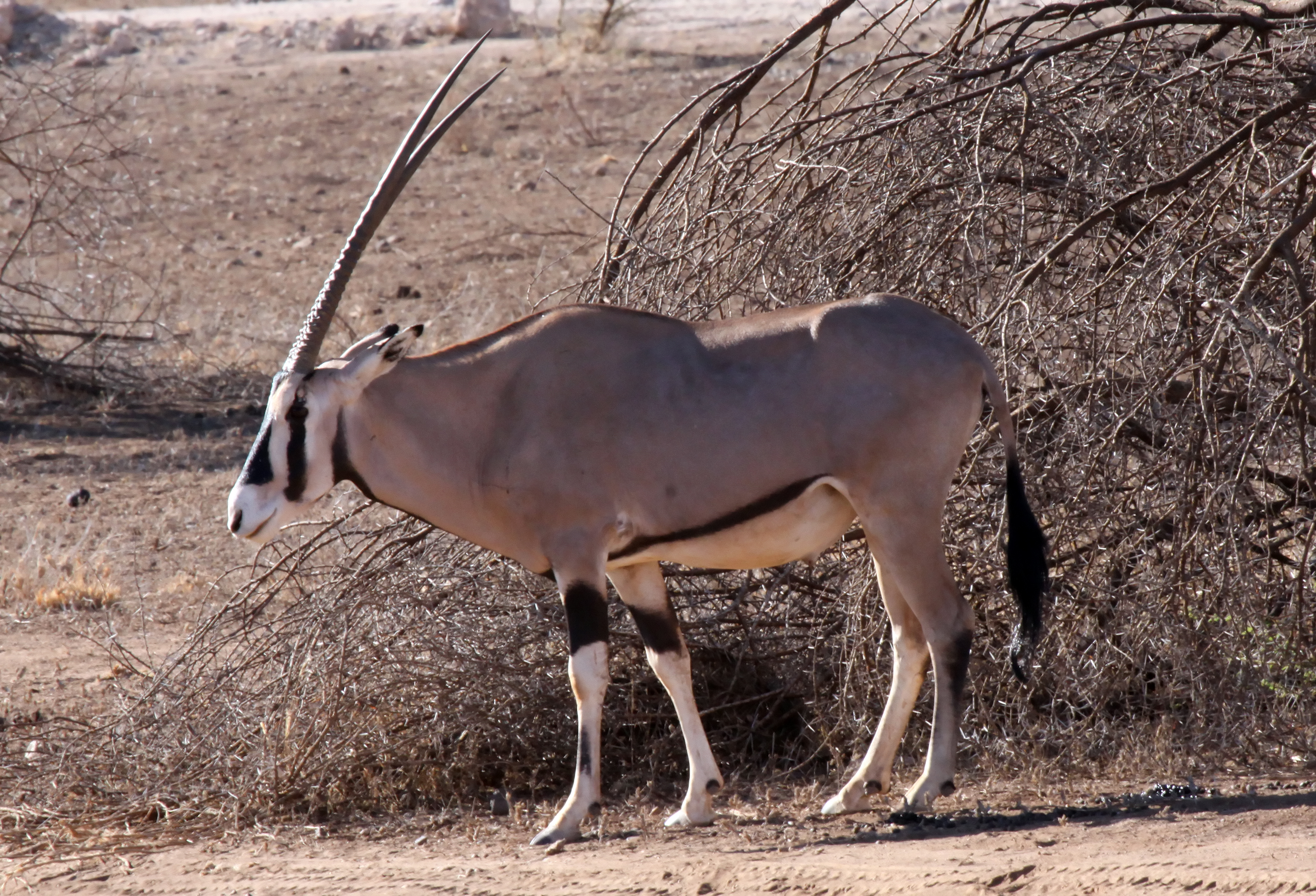 Oryx (Oryx beisa) dans la Réserve nationale de Samburu